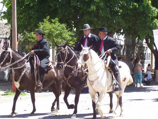 Día de la Tradición en La Carlota, Argentina